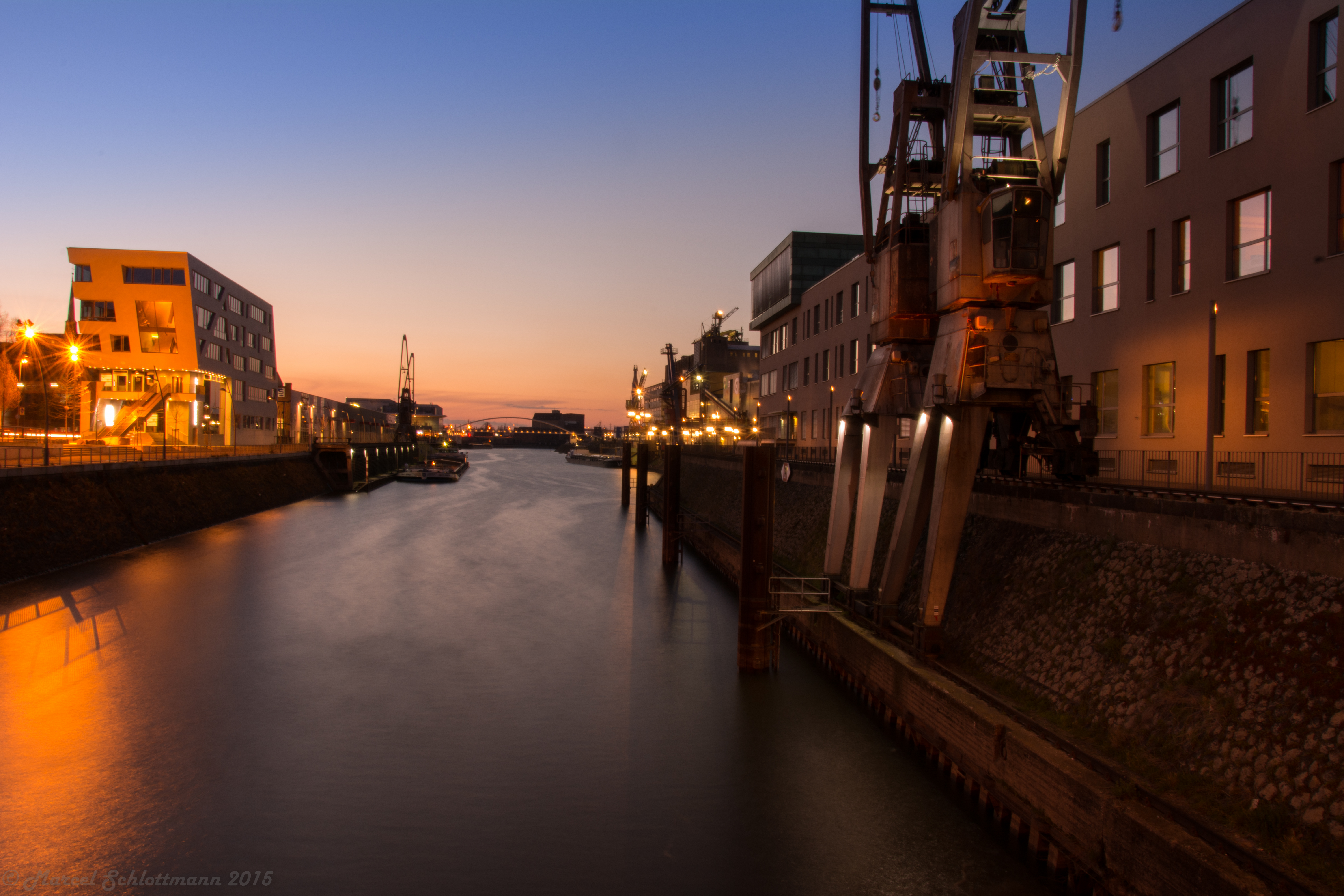 Das Bild wurde im März 2015 im Hafen von Neuss aufgenommen.